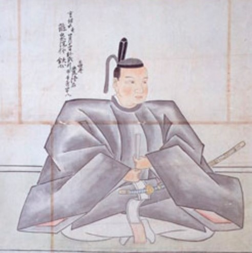 山内豊隆の肖像。